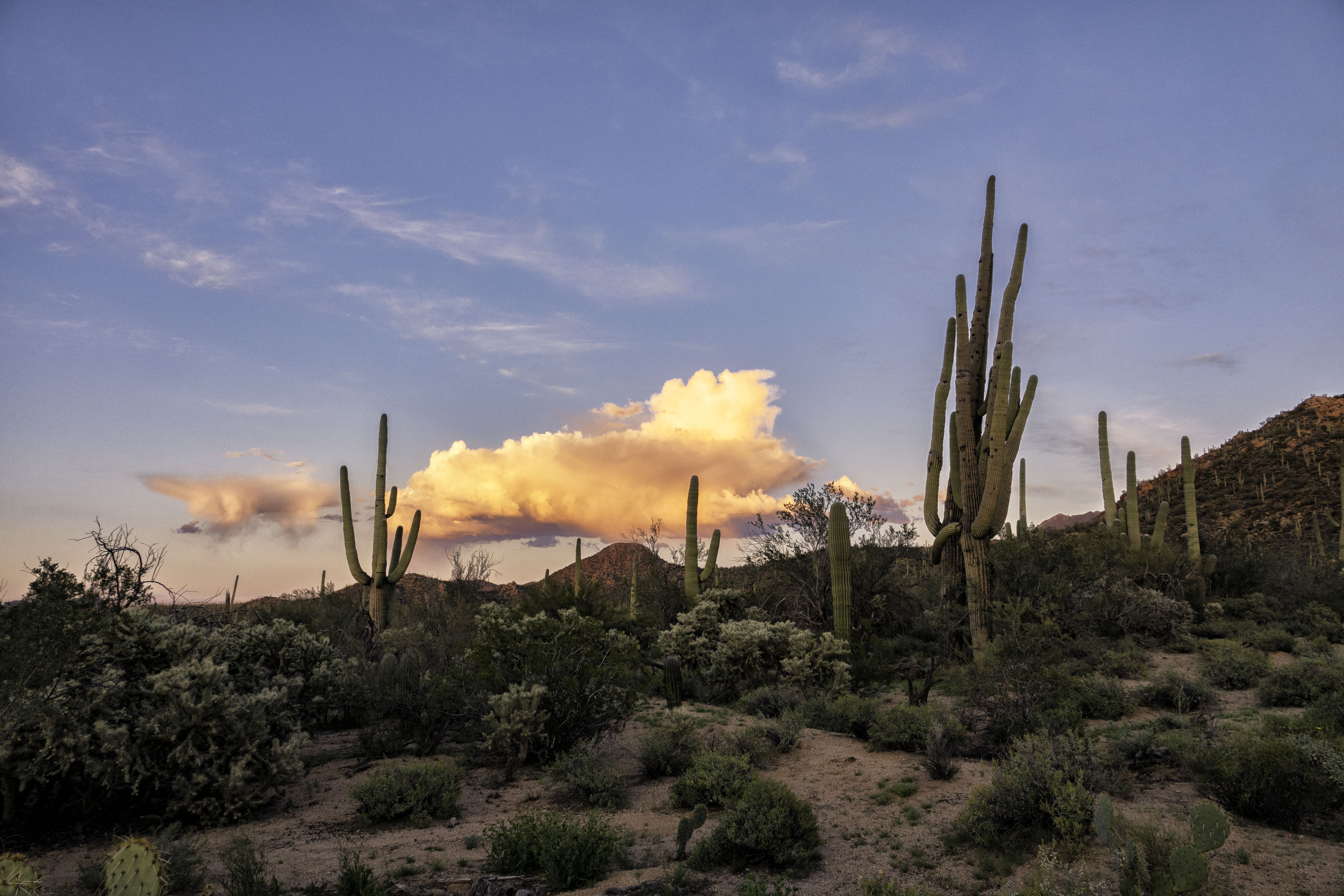 Saguaro National Park, Arizona